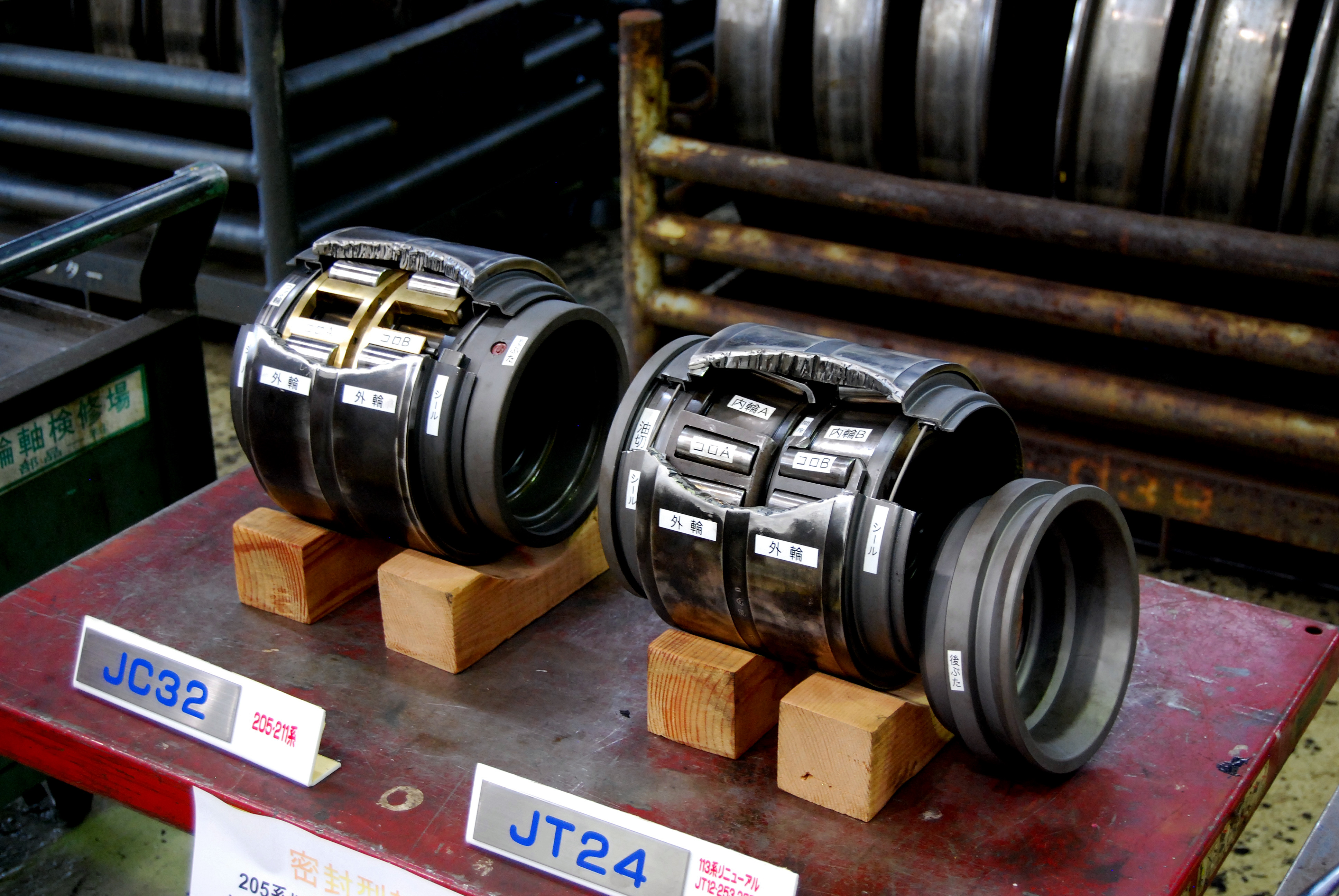 鉄道車両の車軸に使用される軸受（ベアリング）（JRおおみや鉄道ふれあいフェアーでの工場開放にて撮影）